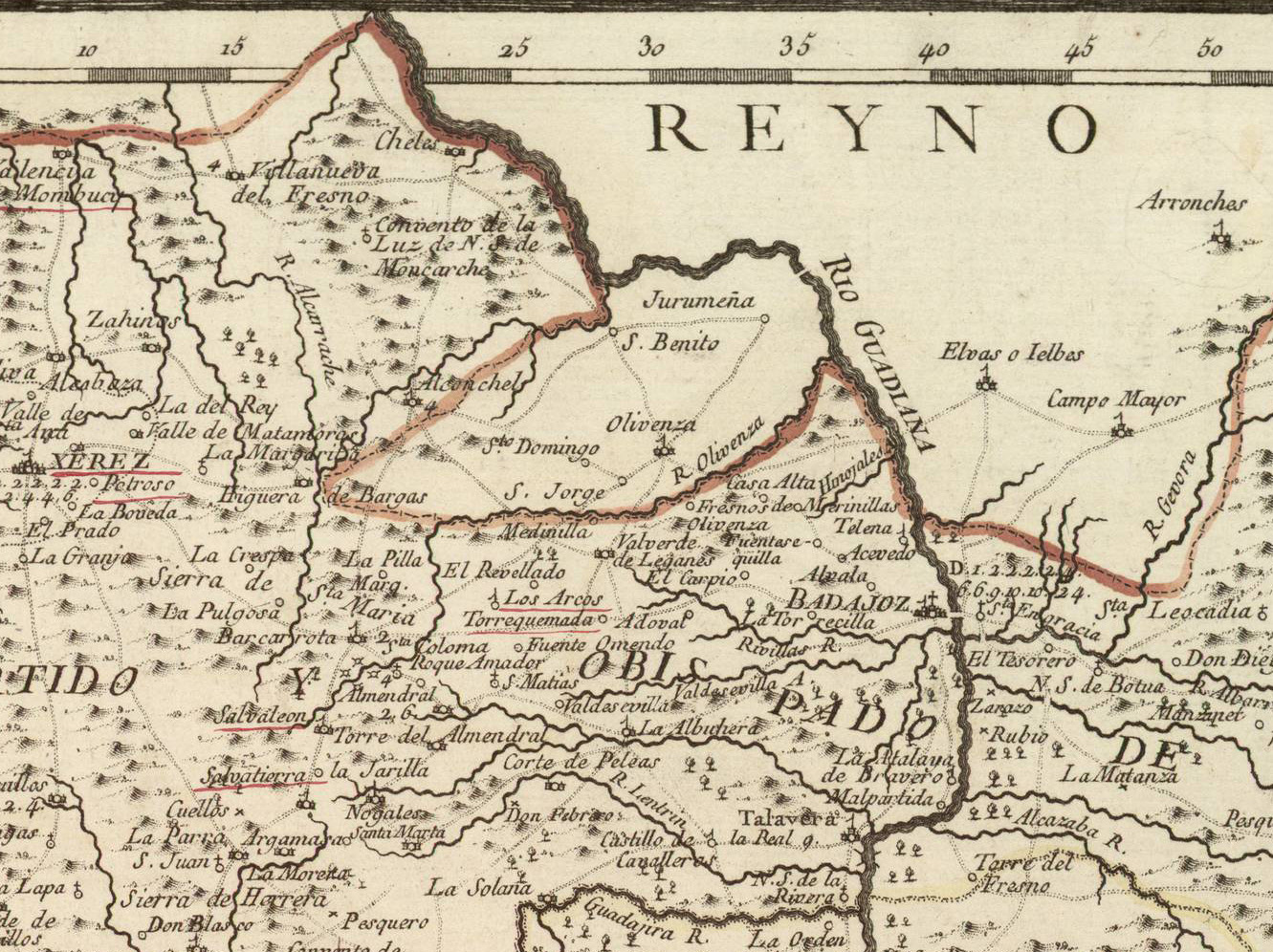 Olivenza y comarcas cercanas en un mapa de la "provincia de Estremadura" publicado por Tomás López en 1766. Nótese que la orientación del mapa es inusual, con el oeste arriba. La línea roja gruesa representa la frontera entre España y Portugal, país al que Olivenza pertenecía por aquel entonces.